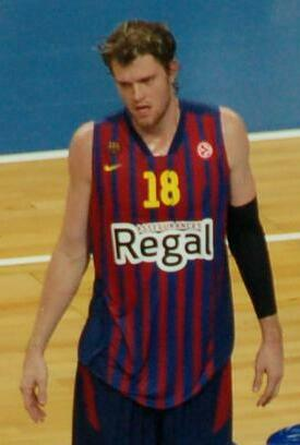 CJ Wallace con la camiseta del FC Barcelona